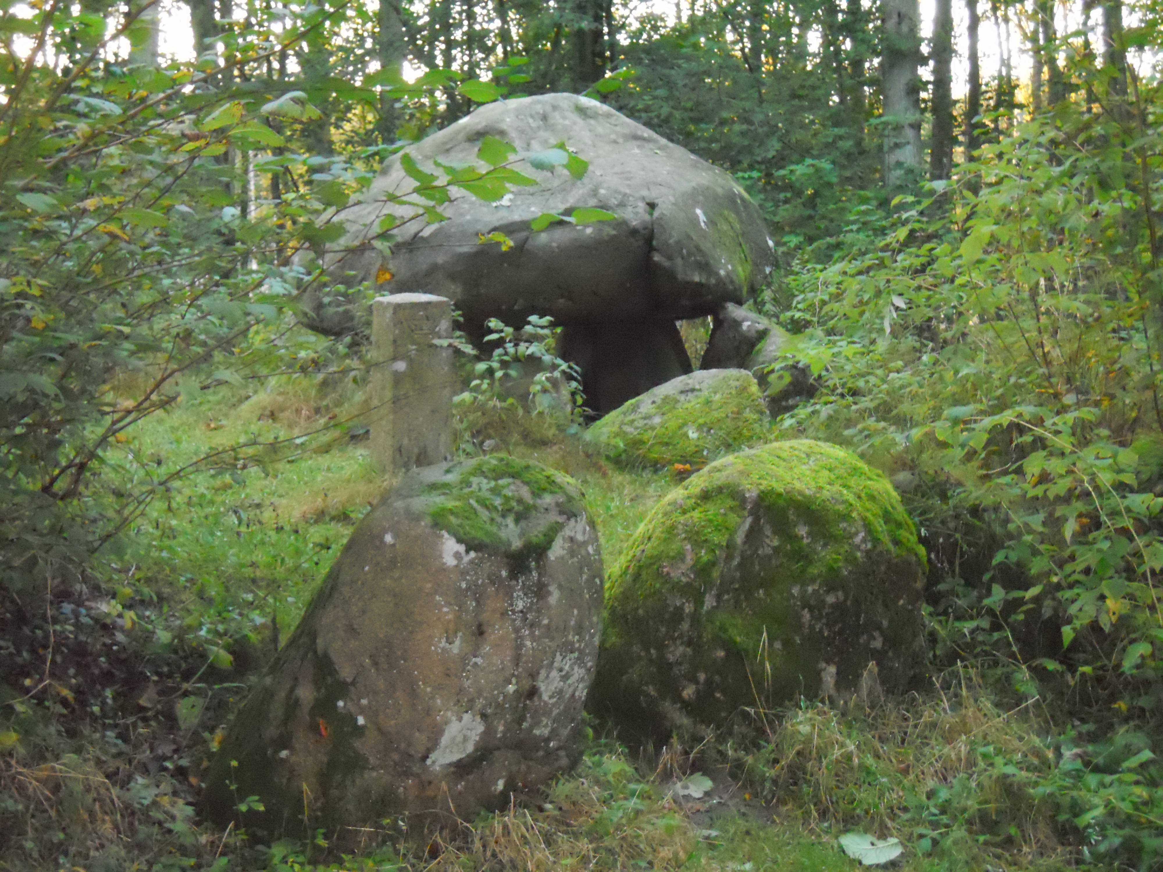 Rundhøj ved Truelstrup